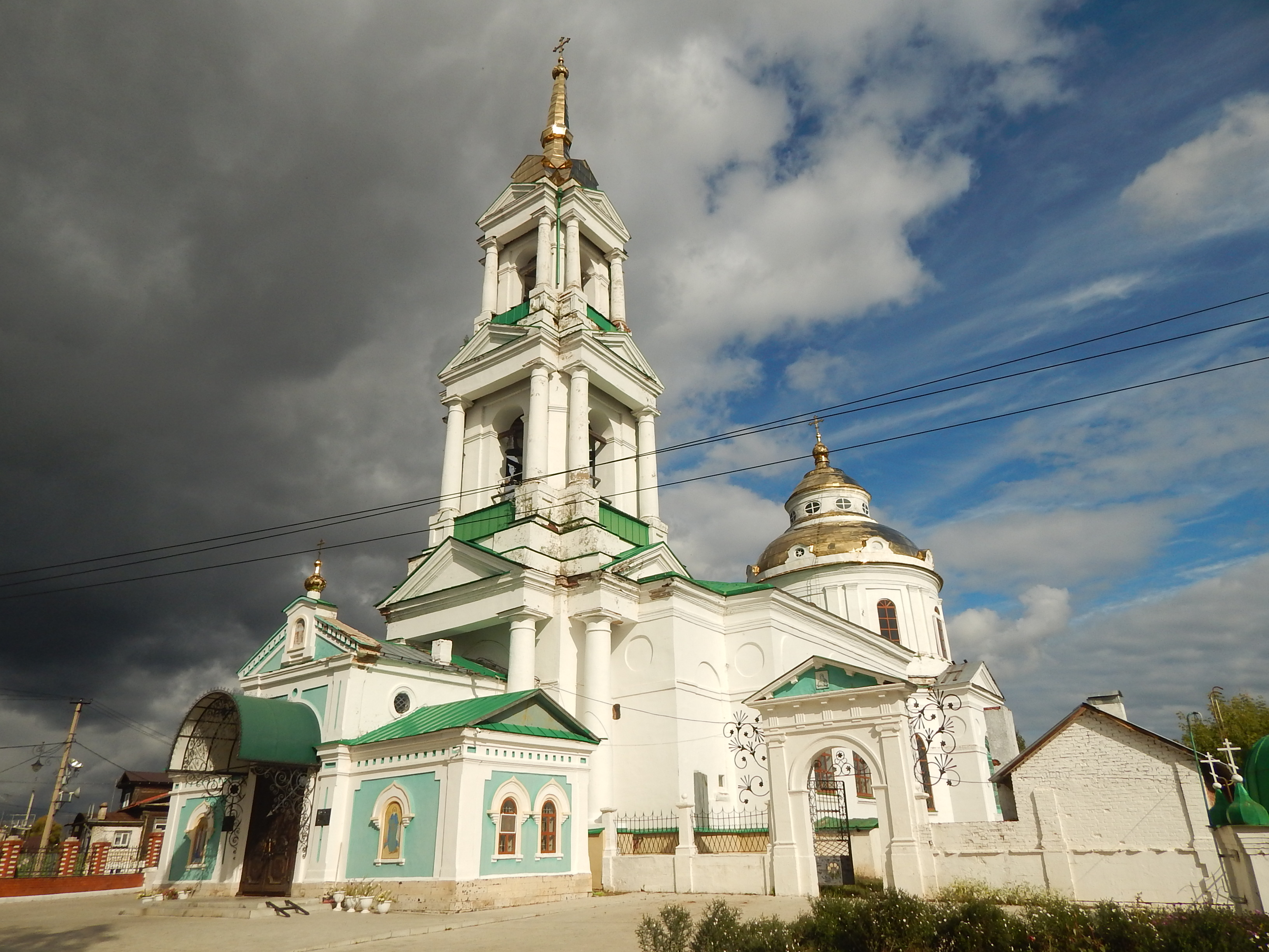 Покровская церковь: улица Набережная, 58, Елабуга, Татарстан